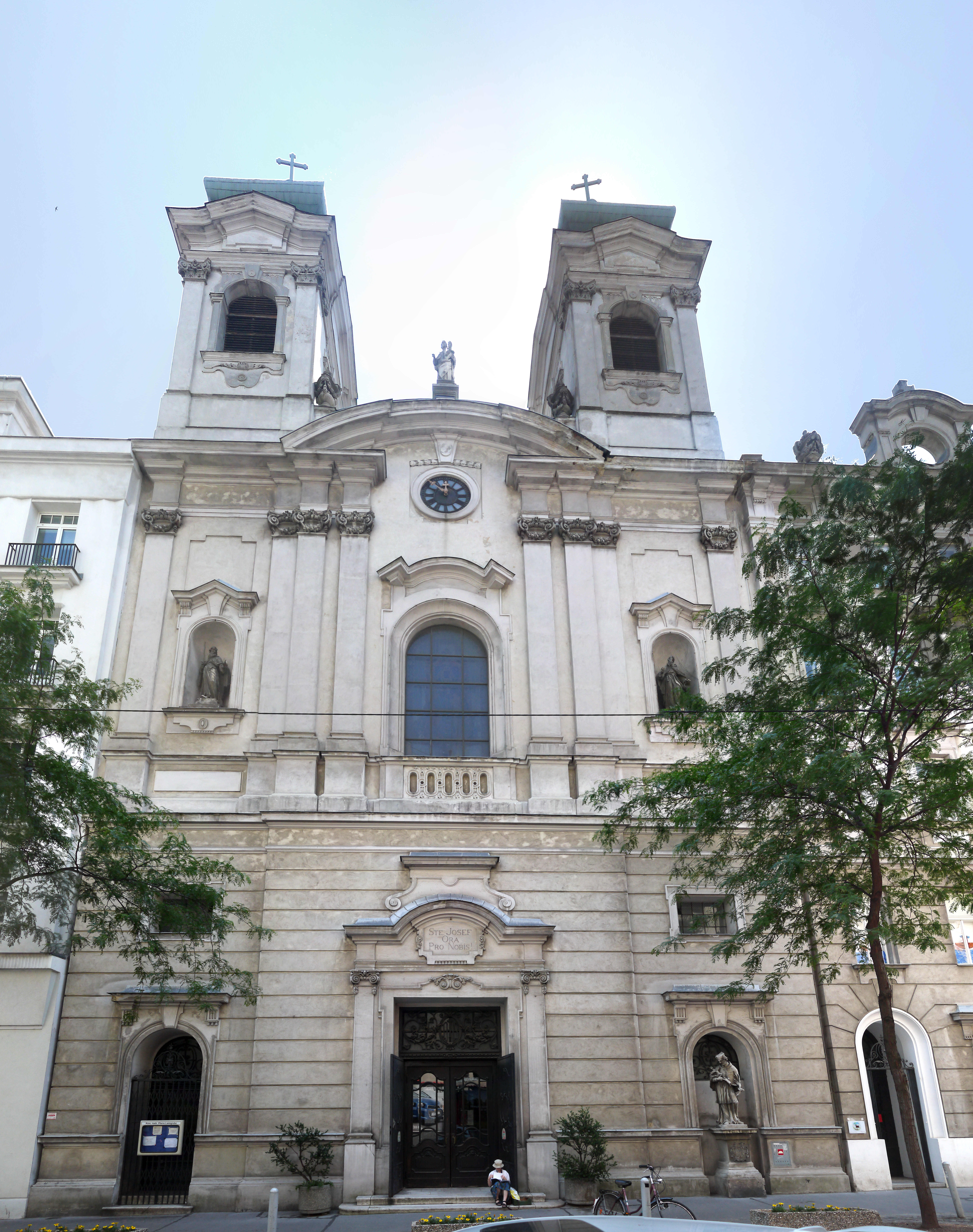 Kath. Pfarrkirche, St. Josef ob der Laimgrube mit Pfarrhof